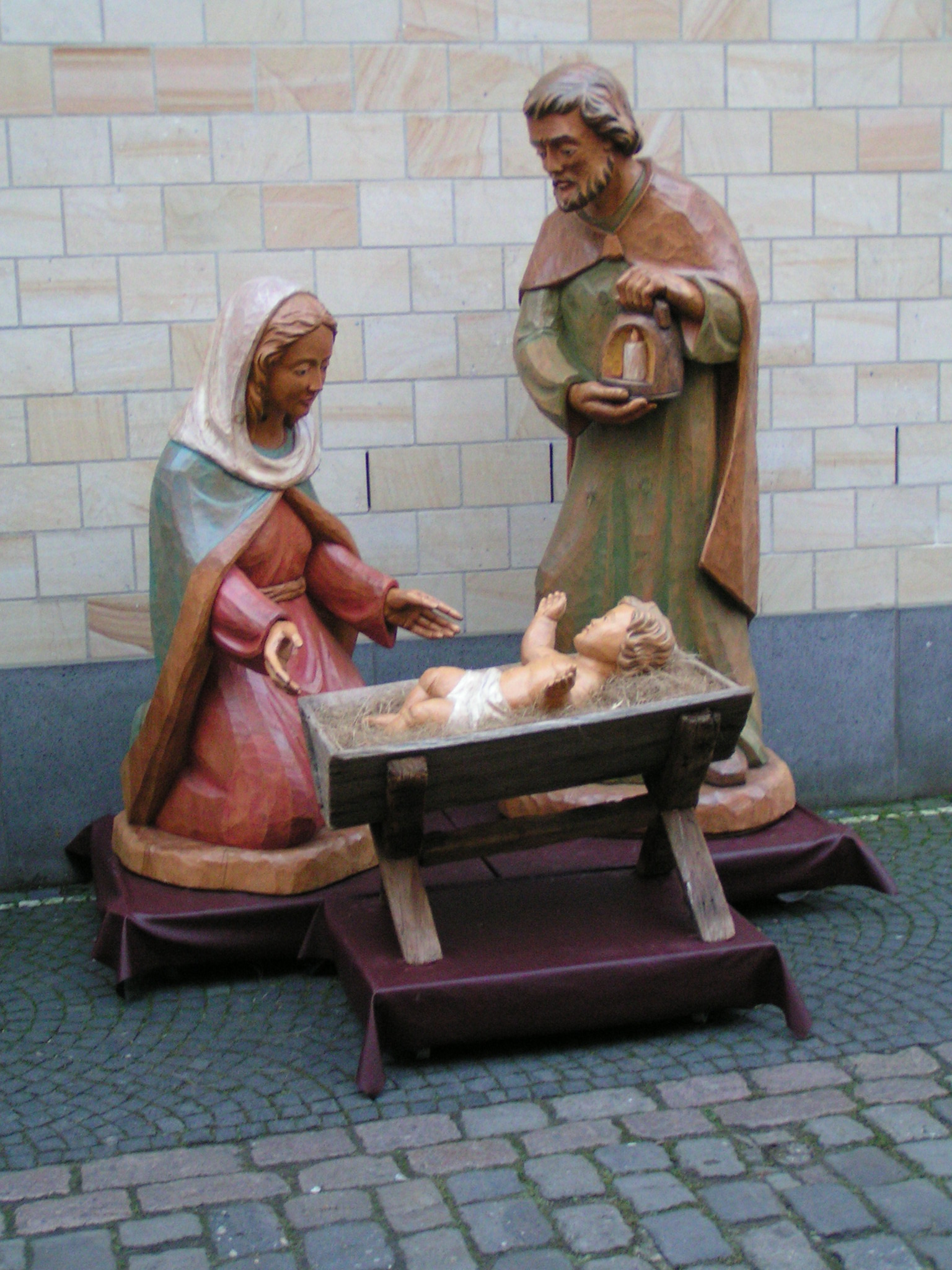 Exponat des Krippenmuseums Telgte